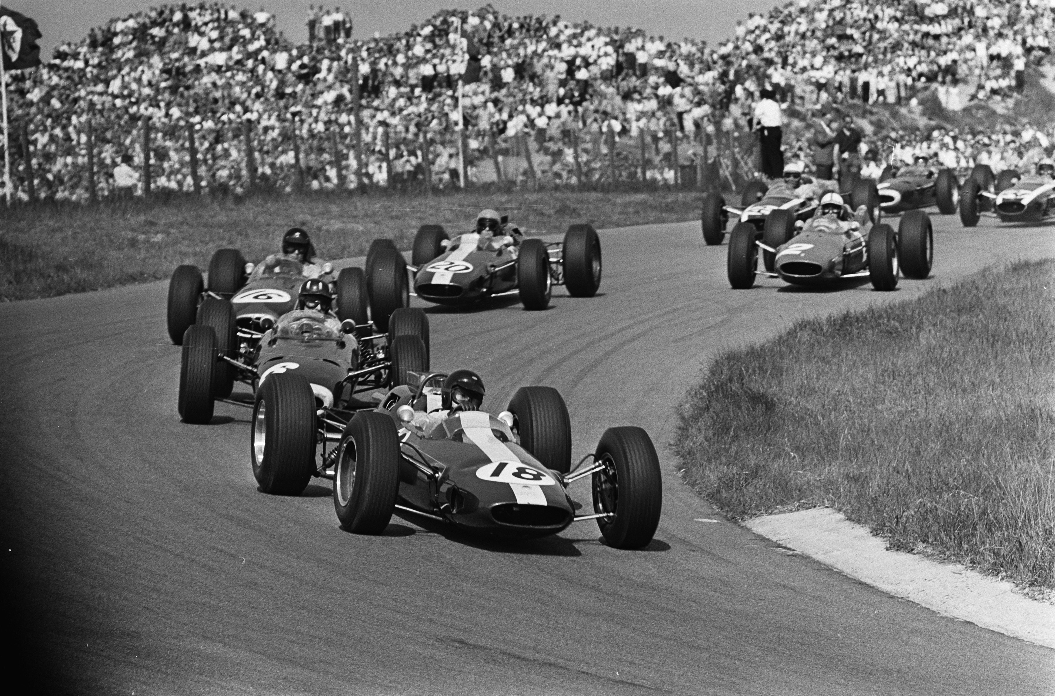 Grand Prix van Nederland, het rennersveld in de bocht aan kop Jim Clark met achter no. 6 Graham Hill , no. 16 Dan Gurney en no. 20 Peter Arundell /.